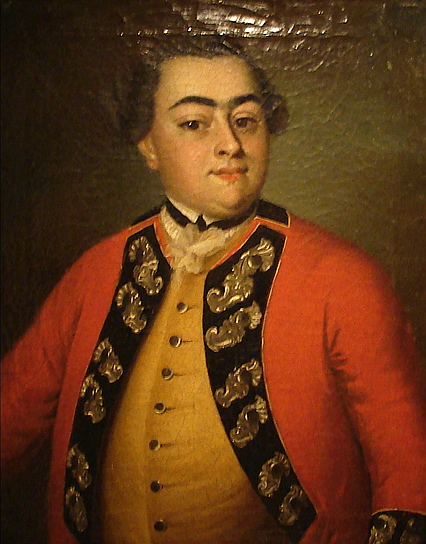 Thomas de Malleville (1742–1798), generalguvernør i Dansk Vestindien, af Andreas P. Brünniche, 1762, Nationalmuséet i København